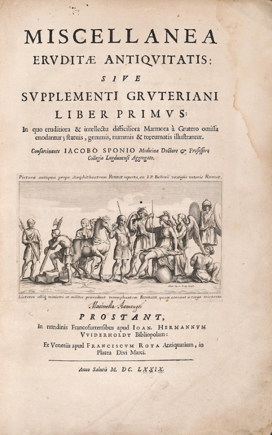 Iacobus Sponius, Miscellanea (1679) titulus